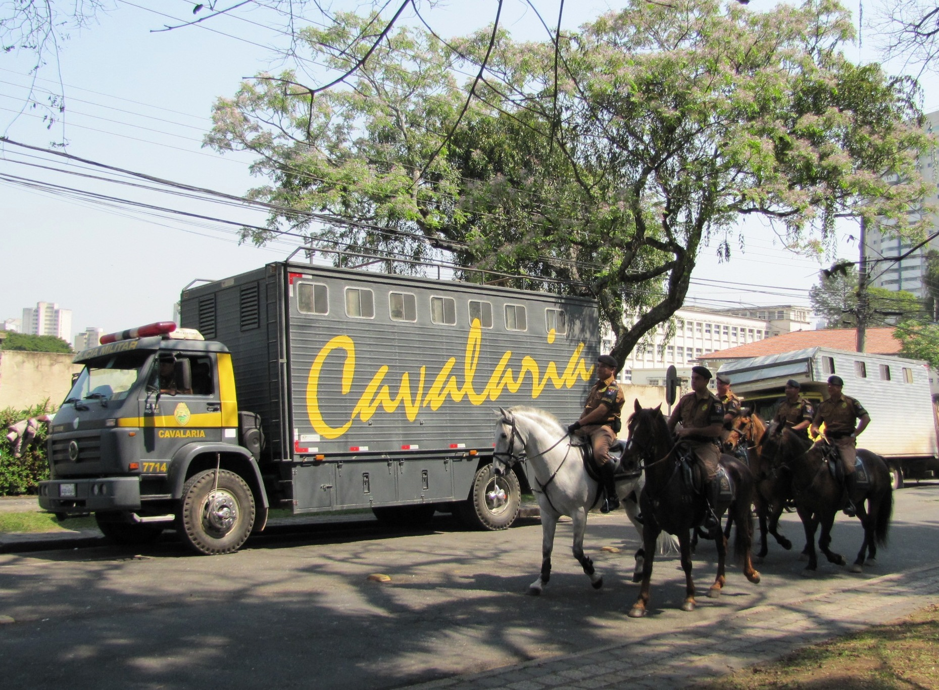 Polícia Montada da Polícia Militar do Paraná.